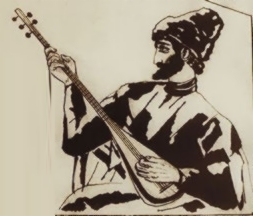 Gusan